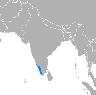 Donde es mayoritario Donde es minoritario